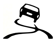 Voorbeeld bitmap naar vector omzetting, gemaakt met opensource programma Inkscape. Let op: Dit is een bitmap afdruk van de vectortekening. Het origineel is een Scalable Vector Graphics, wat niet geupload is, omdat het op de meeste browsers nog niet te zien zou zijn.